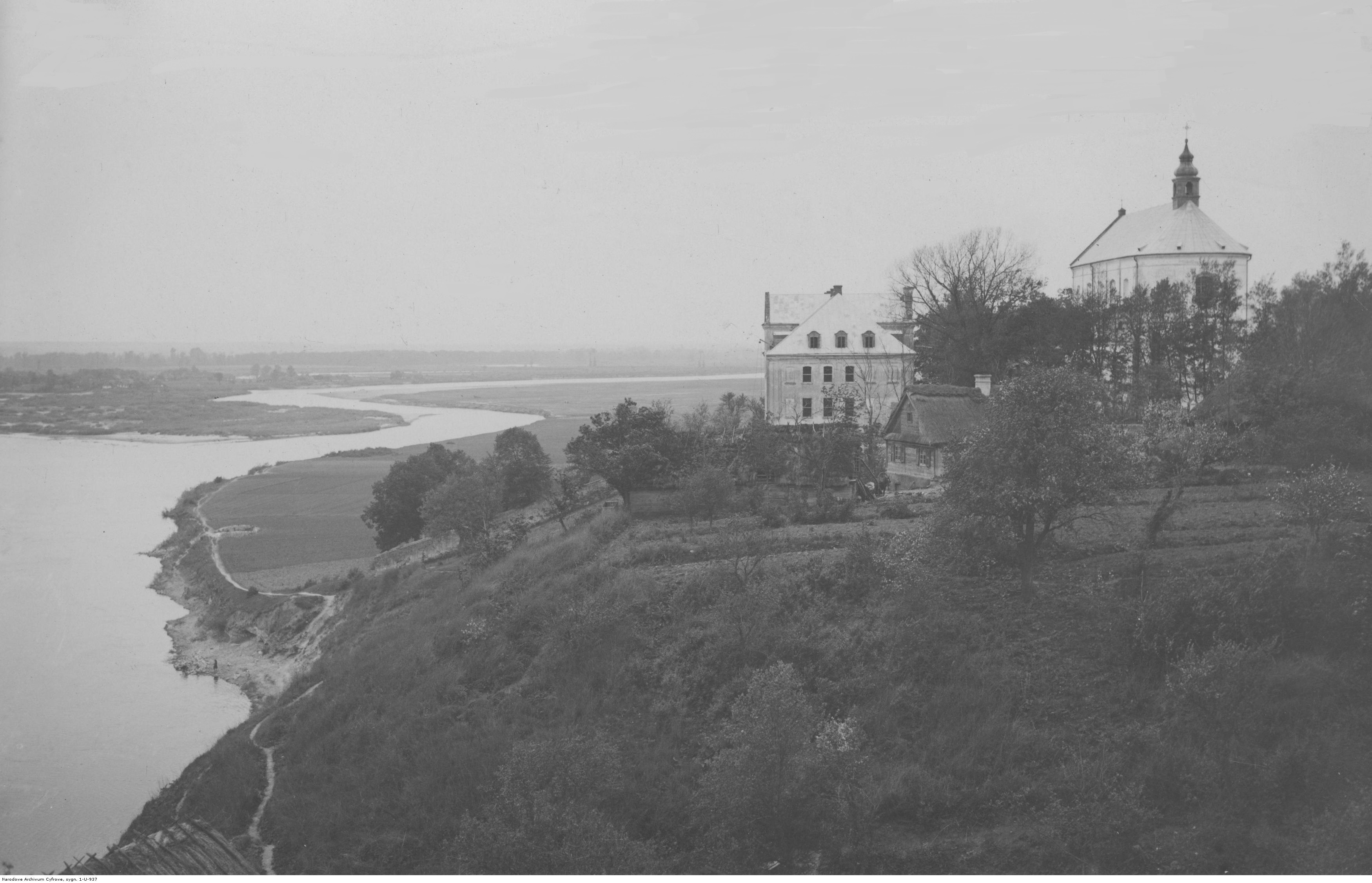 Kościół Trójcy Przenajświętszej (dawny Ojców Jezuitów) w Drohiczynie. Widok zewnętrzny kościoła wraz z panoramą Bugu. Koncern Ilustrowany Kurier Codzienny - Archiwum Ilustracji. Sygnatura: 1-U-937